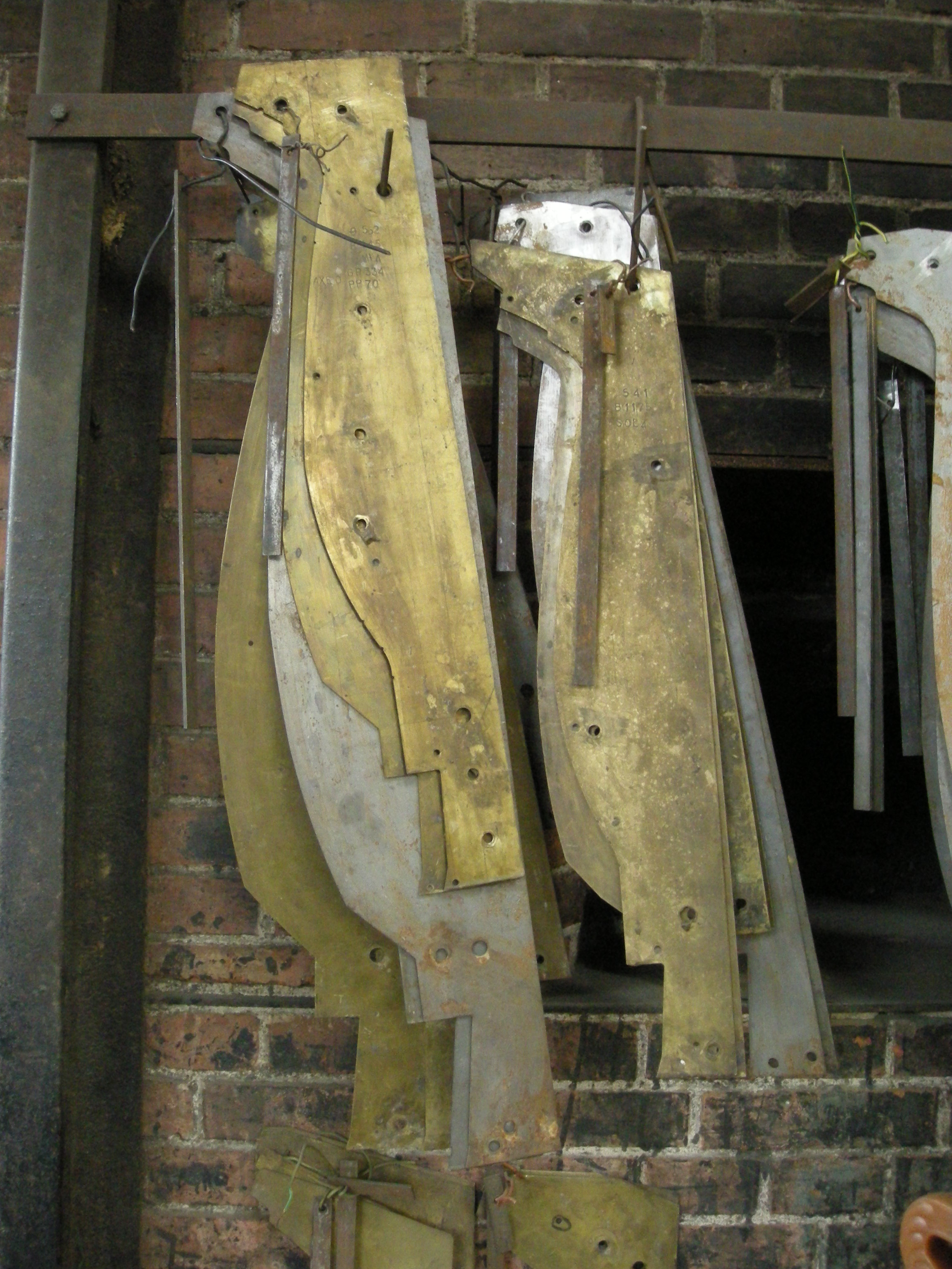 Fonderie de cloches Cornille-Havard à Villedieu-les-Poêles (Manche, Normandie). Gabarits de "fausses cloches", internes et externes.